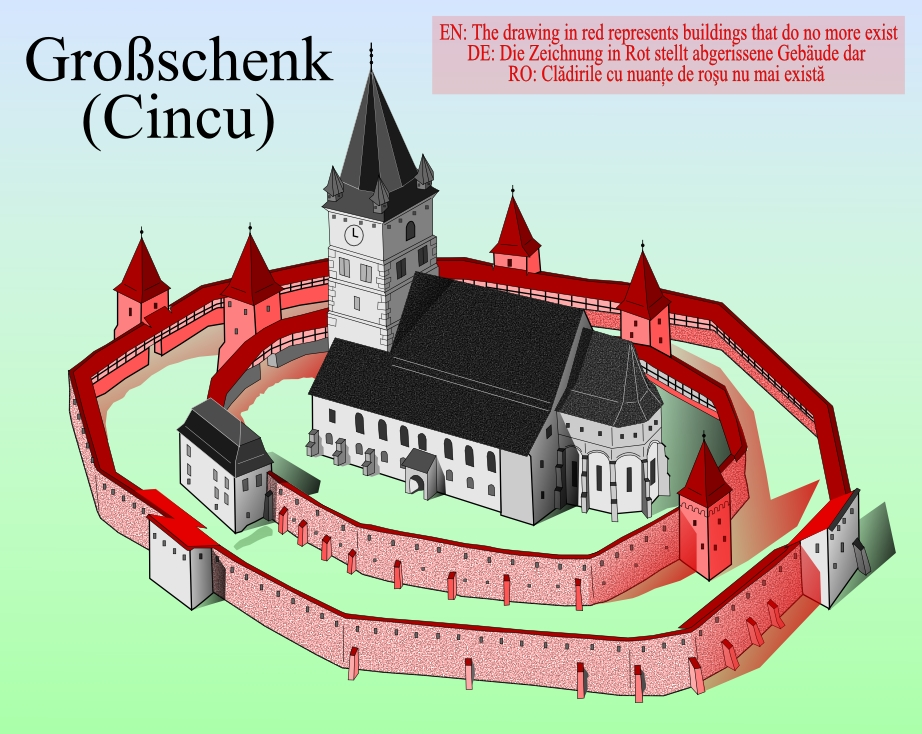 Biserica fortificata din Cincu